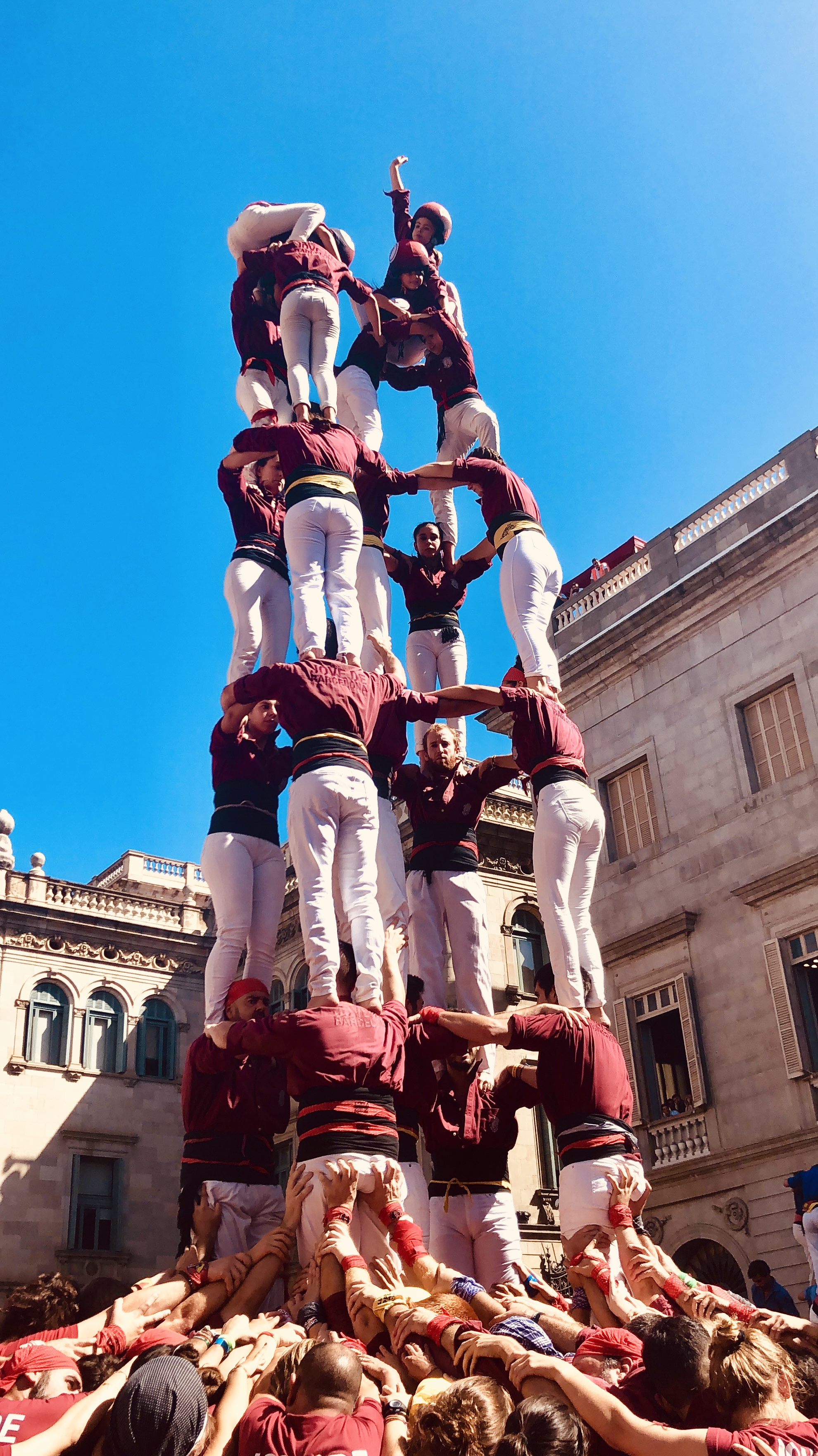 Le tradizionali torri umani, in catalano conosciute con il celebre nome "Castellers".